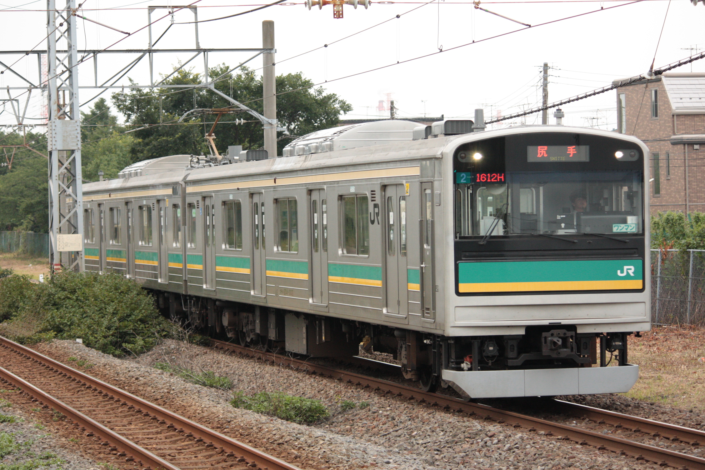 南武支線・川崎新町駅に進入する205系1000番台電車。 Canon EOS Kiss X2